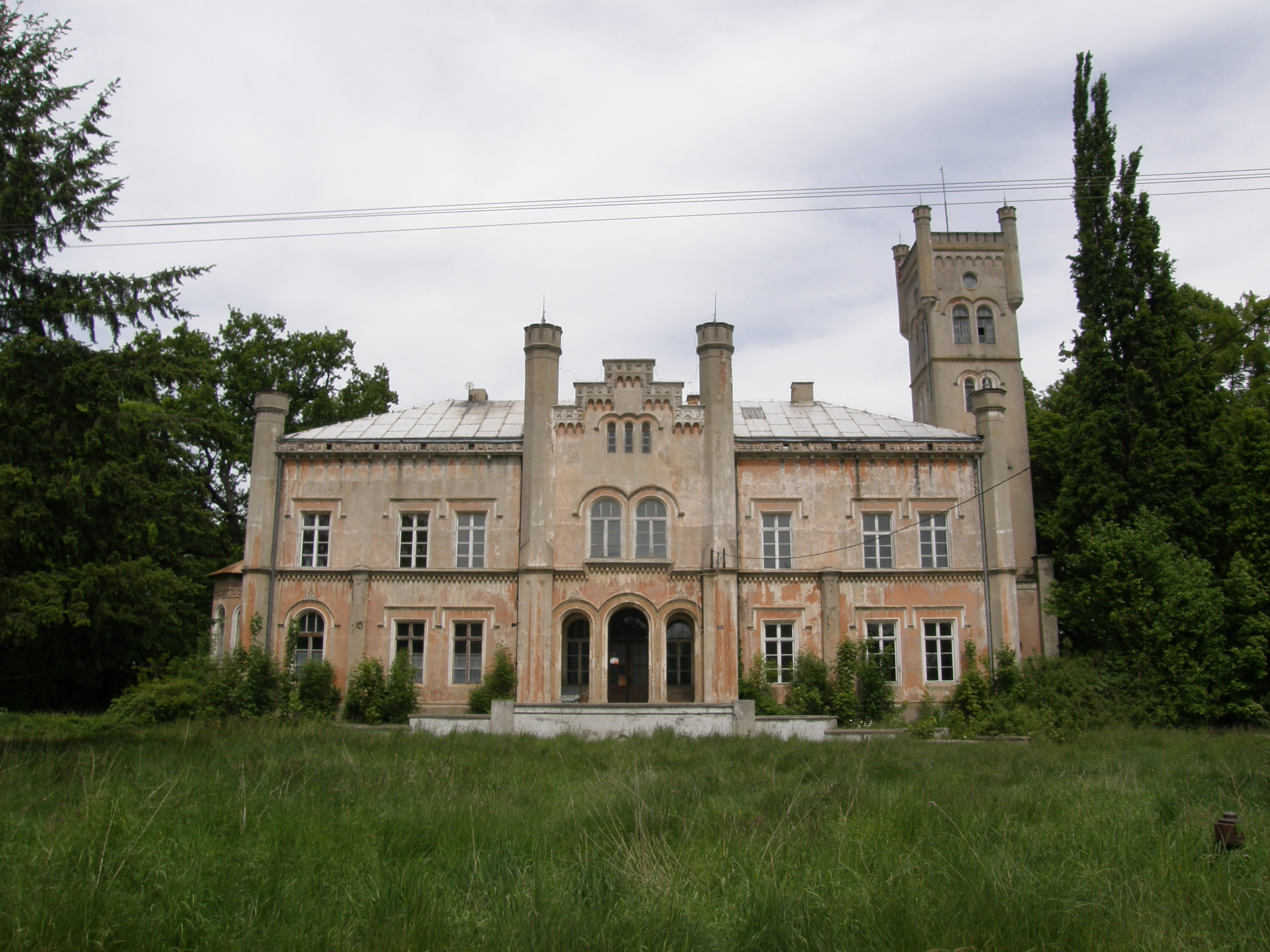 Luboszyce, zespół pałacowy, XVIII/XIX